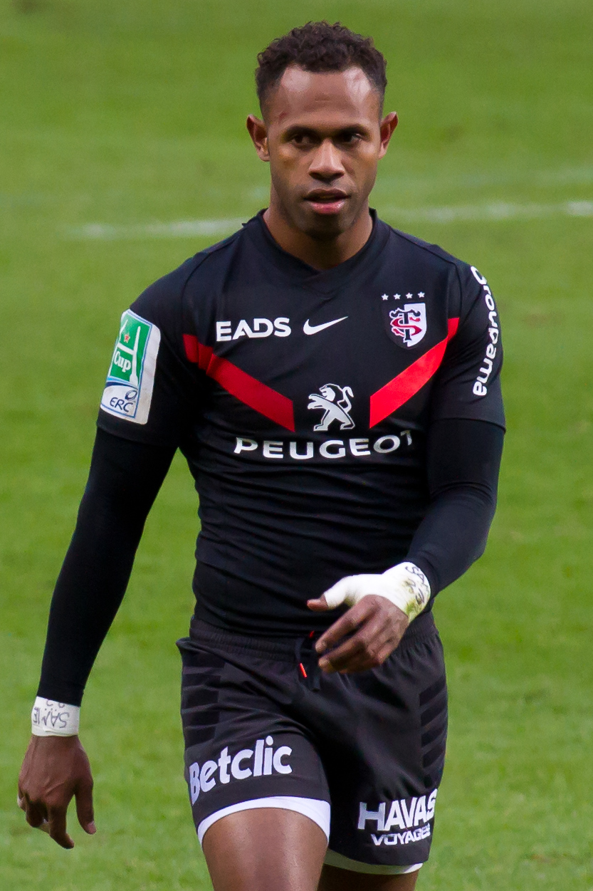 Timoci Matanavu - Heineken Cup 2011-2012 — 18 December 2011, Stadium. Match between: Stade toulousain — Harlequin F.C.